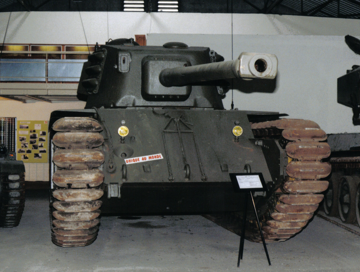 ARL 44 tank in Saumur tank museum